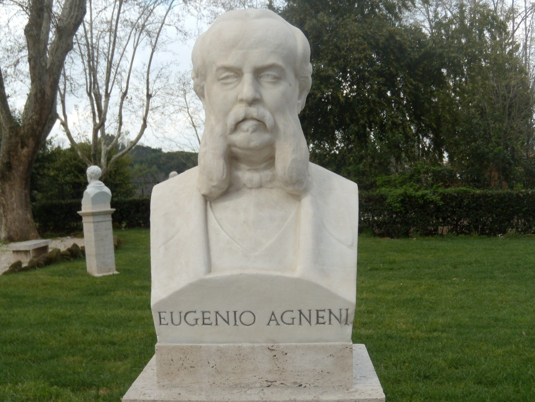 Busto restaurato di Eugenio Agneni